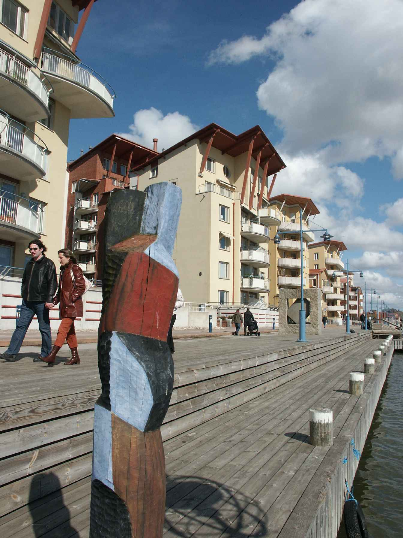 Eriksberg, houses by Göta älv, Gothenburg. Photographer: Erik of Gothenburg.